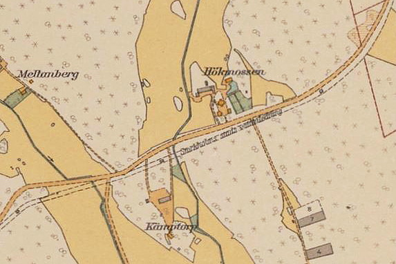 Del av 1920-tals karta för Stockholm och omgivningar visande Hökmossens gård